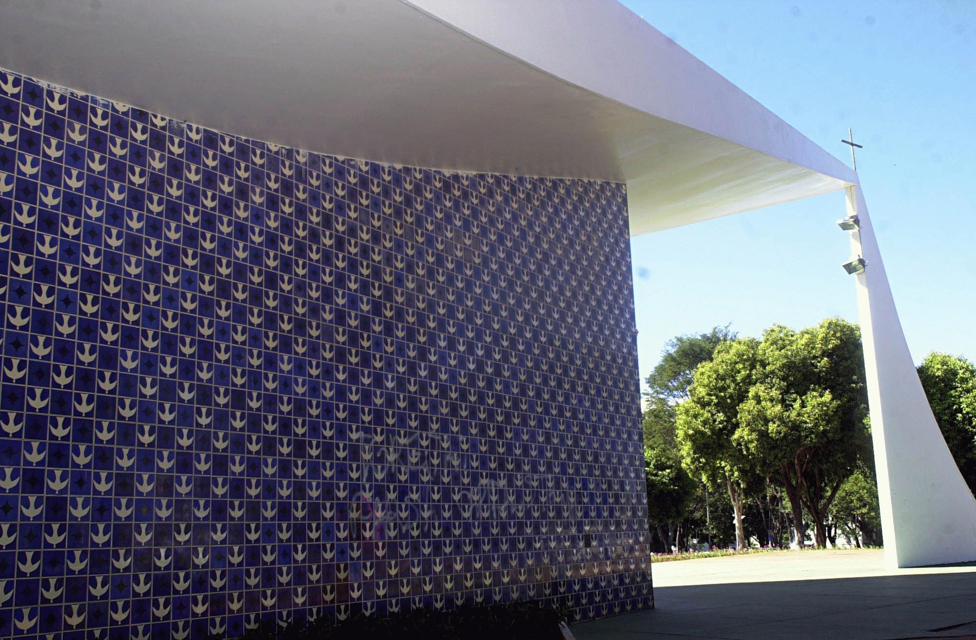 Brasília - Painel de azulejos de Athos Bulcão, na parede lateral da Igrejinha, na 107 Sul.